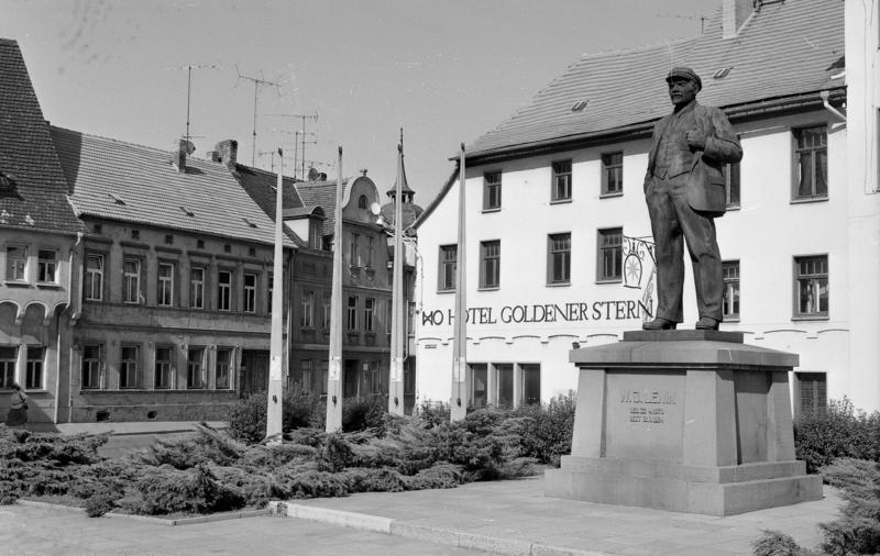 11.-18.8.1991 Bundesland Sachsen-Anhalt Eisleben, Lenin